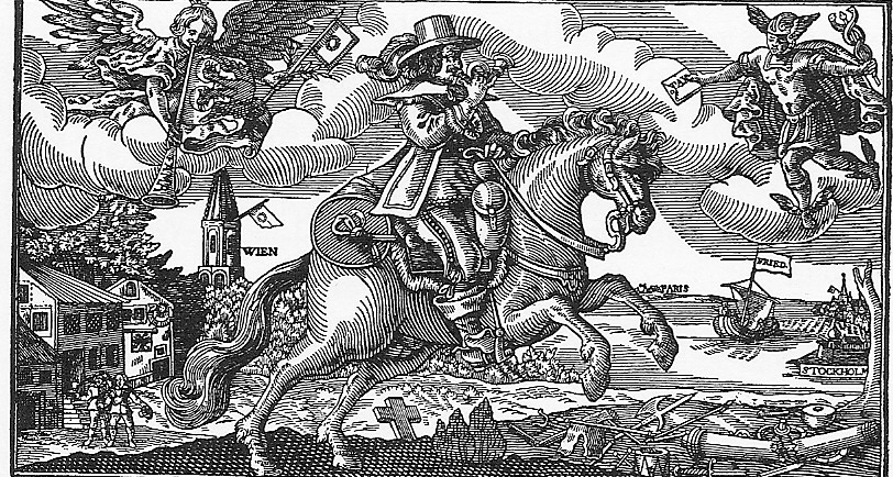 Ausschnitt aus einem Flugblatt von 1648